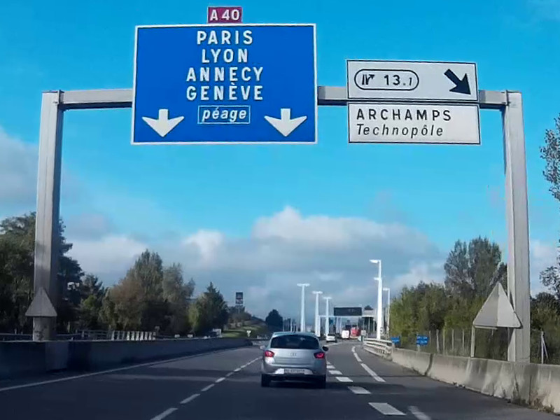 Panneaux routiers français D62c et D31d